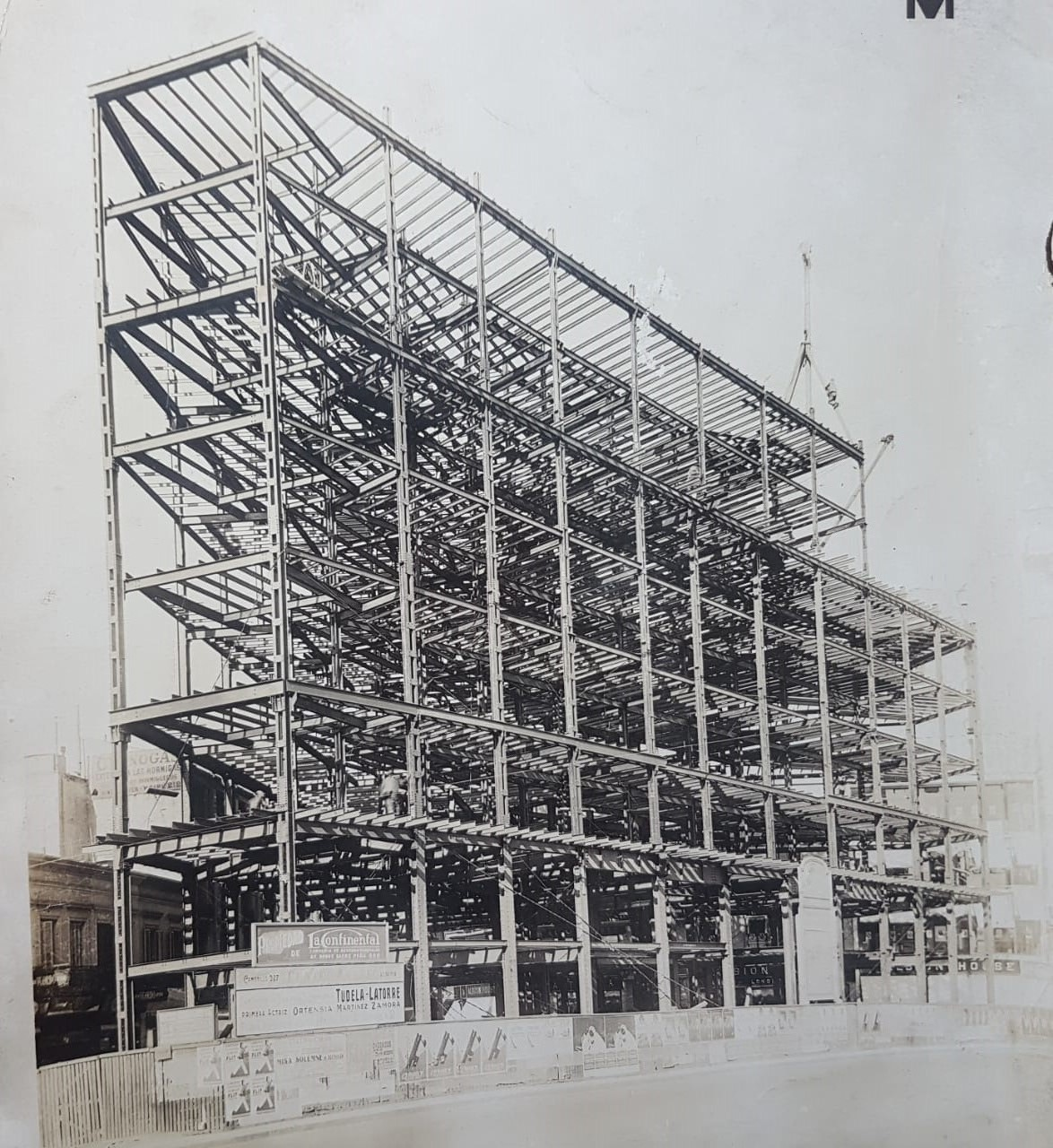 Foto de Talleres Metalúrgicos San Martín, 4 de noviembre de 1928